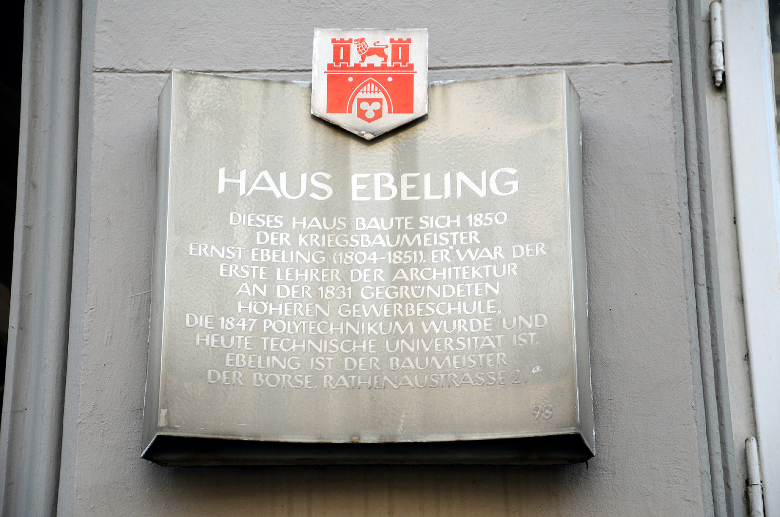 Die hannoversche Stadttafel Nummer 98 am Haus Ebeling in der Landschaftstraße 7 in 30169 Hannover-Mitte: „Dieses Haus baute sich 1850 der Kriegsbaumeister Ernst Ebeling (1805-1851). Er war der erste Lehrer der Architektur an der 1831 gegründeten Höheren Gewerbeschule, die 1847 Polytechnikum wurde und heute Technische Universität ist. Ebeling ist der Baumeister der Börse Rathenaustraße 2“